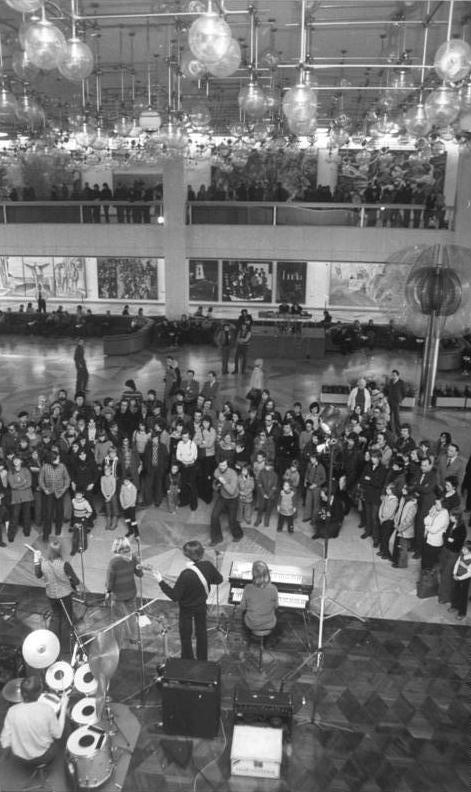 ADN-ZB Rehfeld-19.2.78 Berlin: 8. Festival des politischen Liedes- Mit einem Foyerkonzert im Palast der Republik begann am 19.2.78 unter Mitwirkung der Gruppe Faelles Akkorden aus Dänemark der vorletzte Tag des Festivals. An der Veranstaltung am Sonntag vormittag nahmen weiterhin Gruppen aus Bulgarien, Portugal und die Solistin Danielle Villeriere teil.